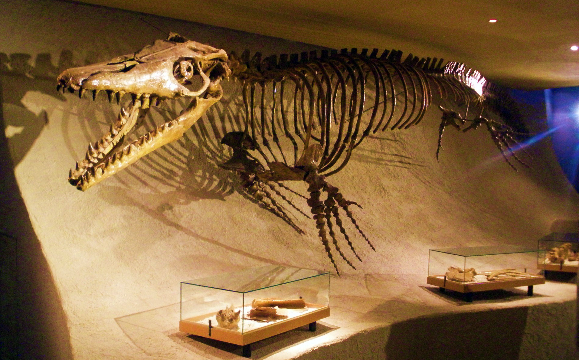 Fossil of Mosasaurus, an extinct mosasaur- Took the photo at Natural History Museum of Maastricht